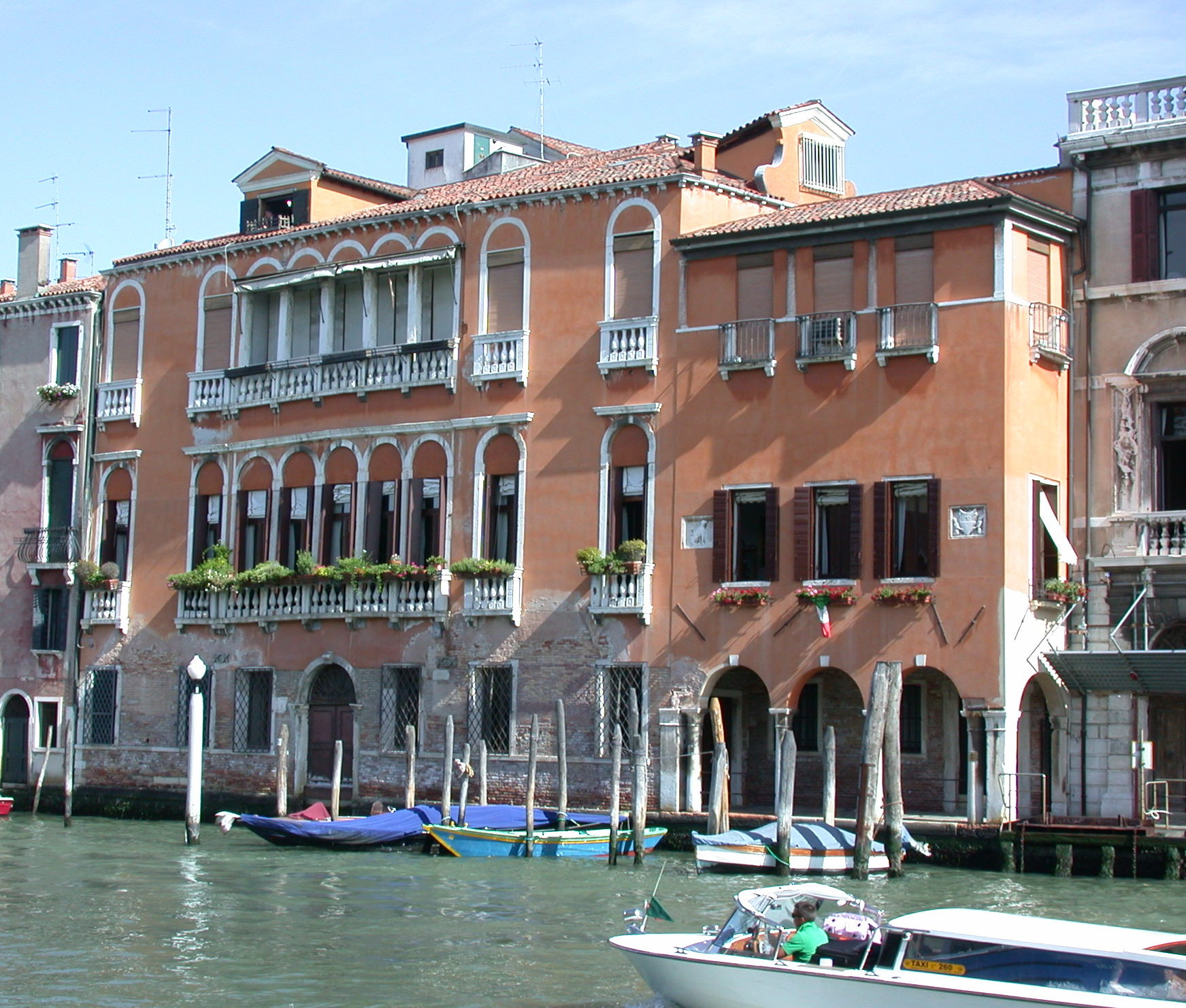 Il Palazzo Gritti Dandolo a Venezia.